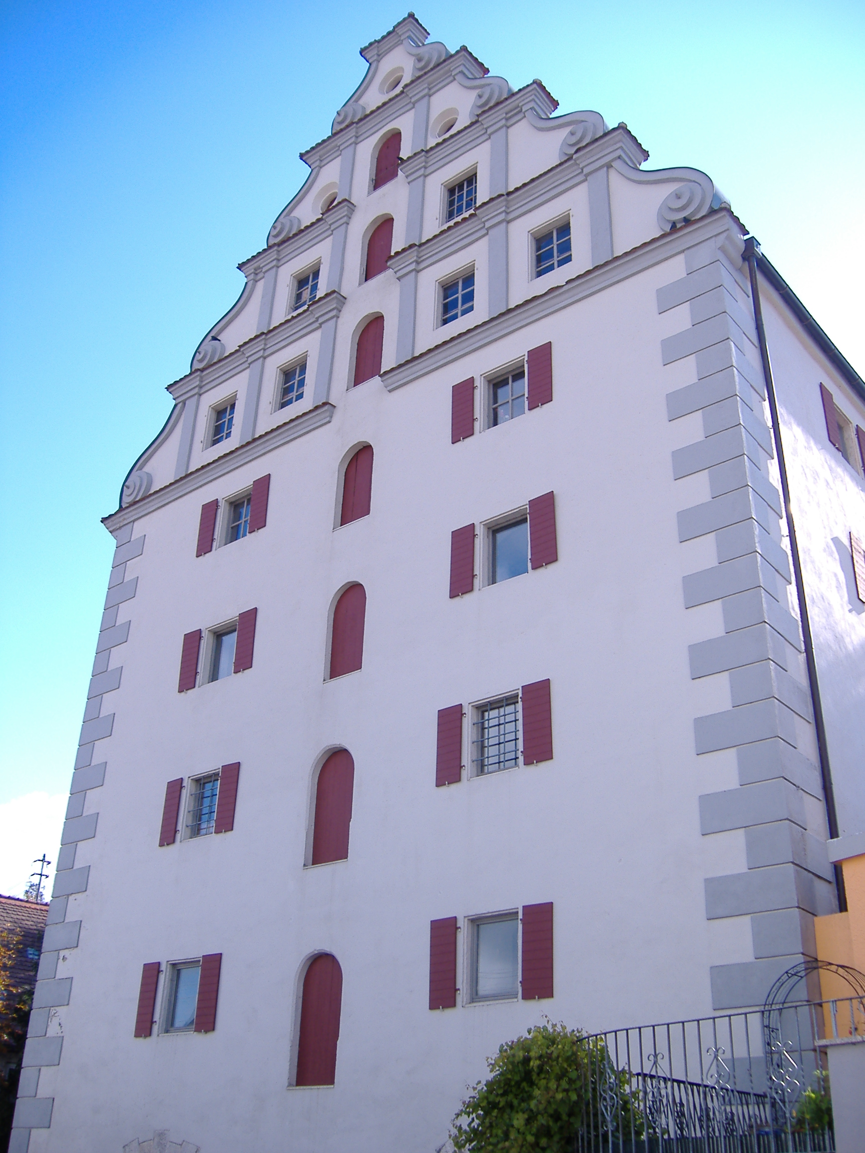 Höchstädt